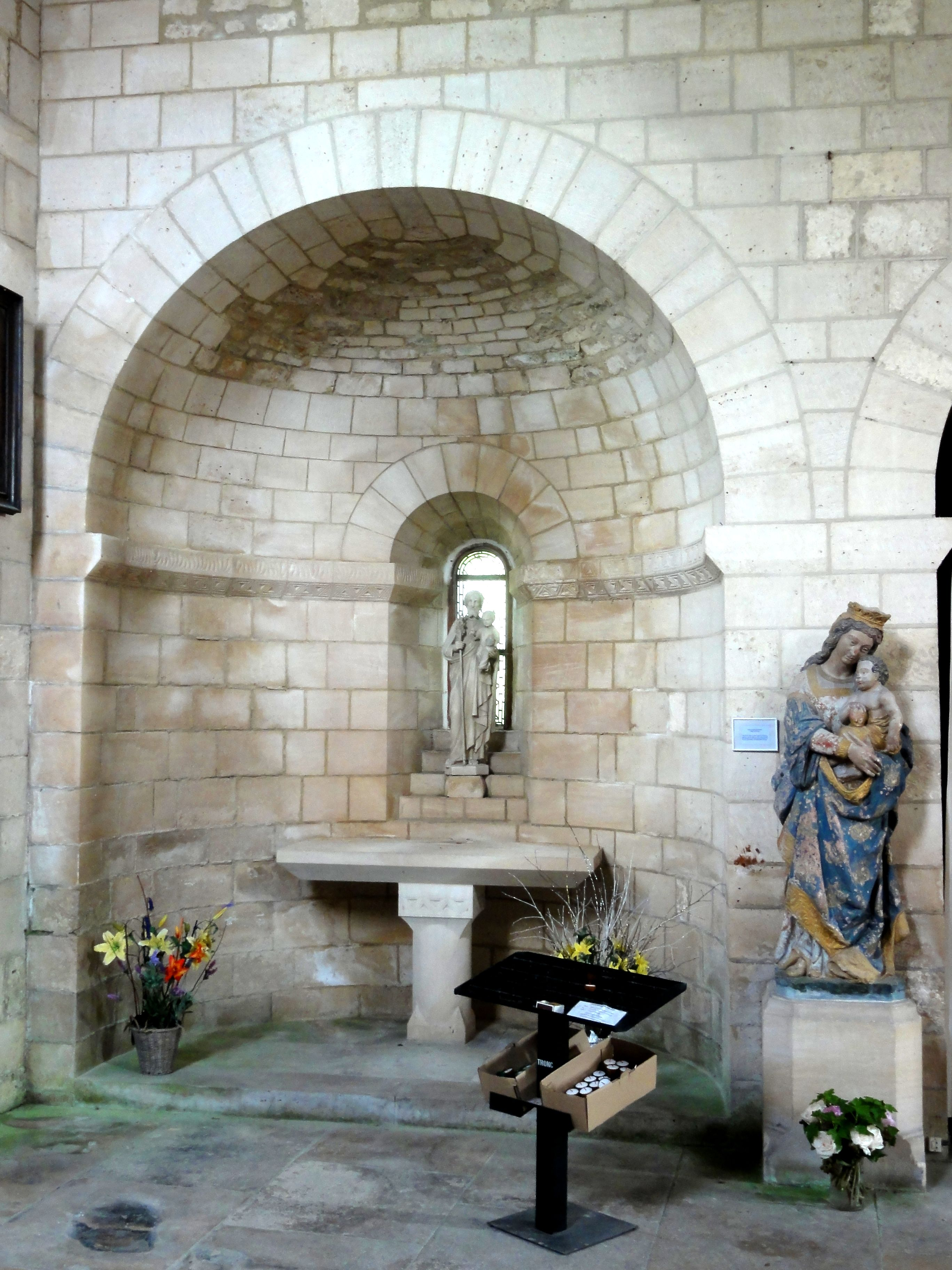 Absidiole du croisillon nord.